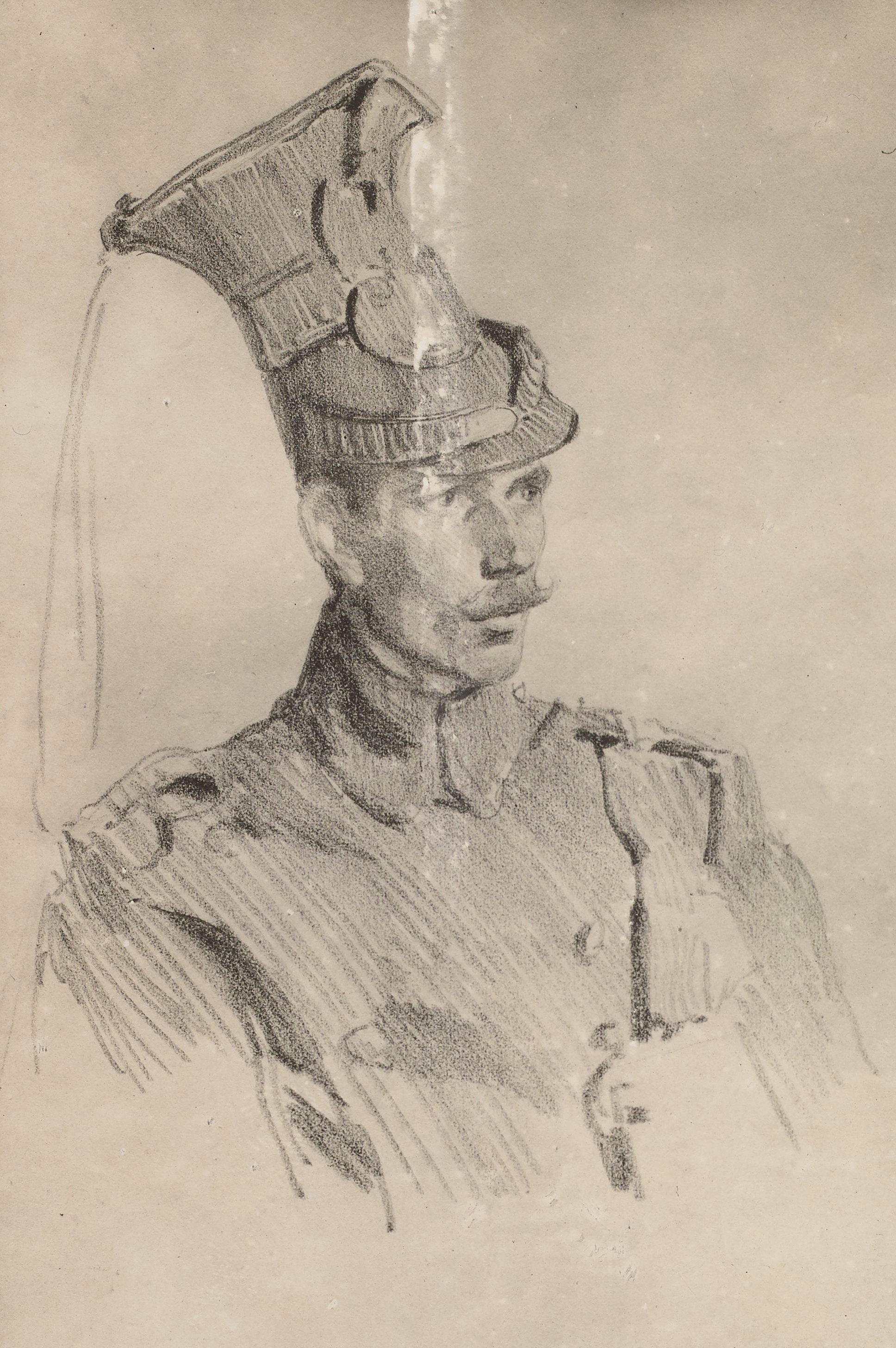 Stanisław Zdyb w mundurze legionisty